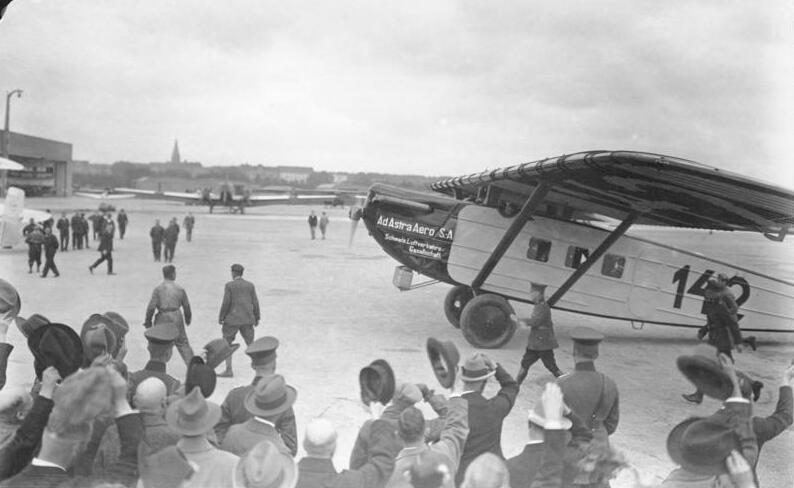 Berlin, Landung von Walter Mittelholzer Berlin; Walter Mittelholzer landet auf dem Tempelhofer Feld [in Berlin] [Berlin.- Landung von Walter Mittelholzer mit einem Flugzeug der AdAstra Aero S.-A. Schweiz. Luftverkehrs-Gesellschaft (Kennung 142) auf dem Flugplatz Tempelhof] Information added by Wikimedia users.Landung von Walter Mittelholzer mit einer Dornier B-Bal "Merkur" Flugzeug der AdAstra Aero S.-A. Schweiz Luftverkehrs-Gesellschaft (Kennung CH-142) auf dem Flugplatz Berlin-Tempelhof. Walter Mittelholzer war Flugpionier und wurde 1920 Direktor und Chefpilot der Ad Astra Aero, aus der später die Swissair entstand. Das Flugzeug CH-142 kaufte Ad Astra am 20. Mai 1927 von der Gren S.A. Es wurde am 26. März 1931 von der Swissair übernommen und 1932 verschrottet.[1]Das angegebene Datum "1922" muss deshalb falsch sein. Im Hintergrund ist ein Maschine von Junkers zu sehen, möglicherweise eine G24. Ähnliche Modelle (G23, G24, G31) baute Junkers erst ab Mitte der 1920er Jahre.